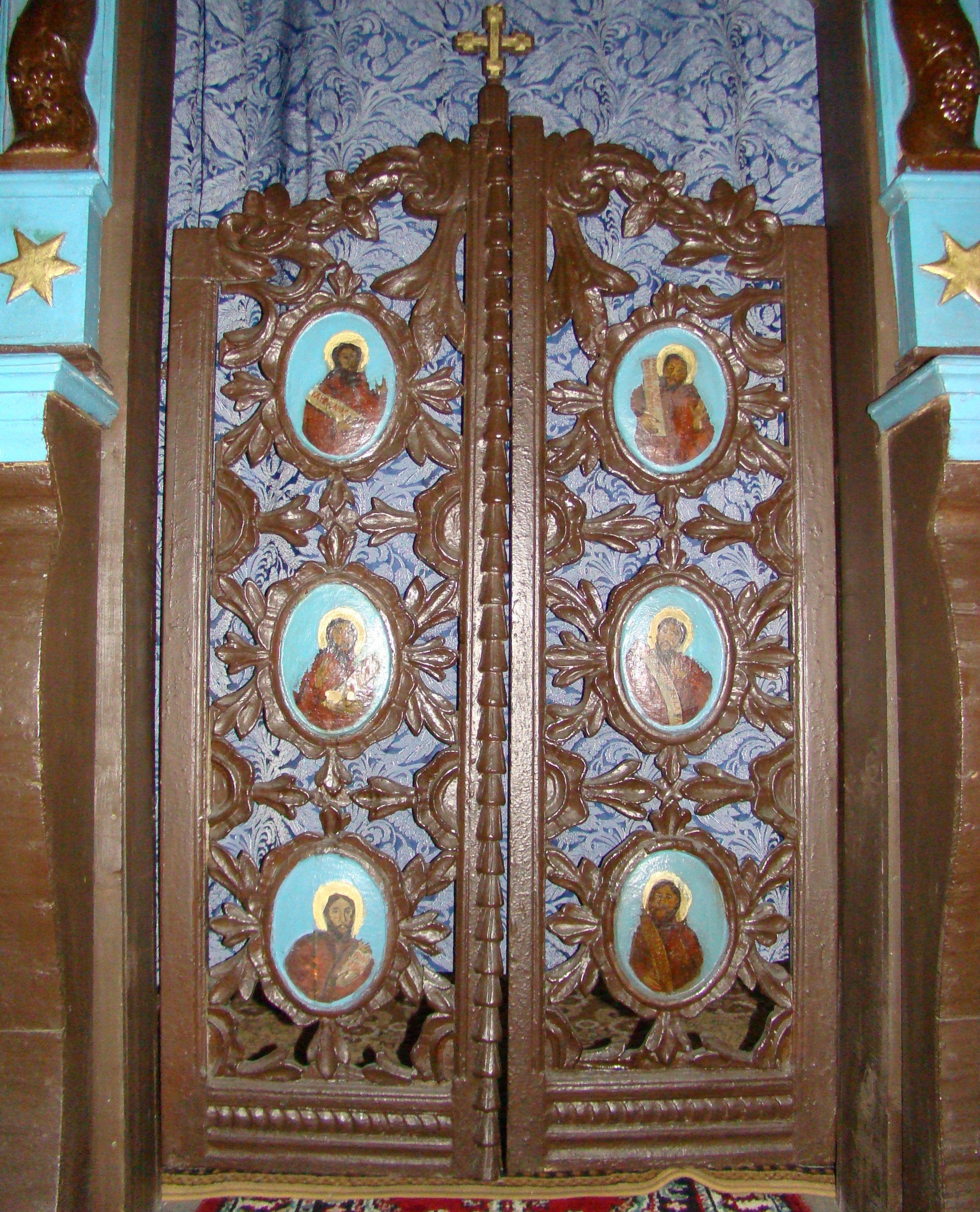 Biserica de lemn, sat aparţinător SFÂNTU GHEORGHE; oraş IERNUT